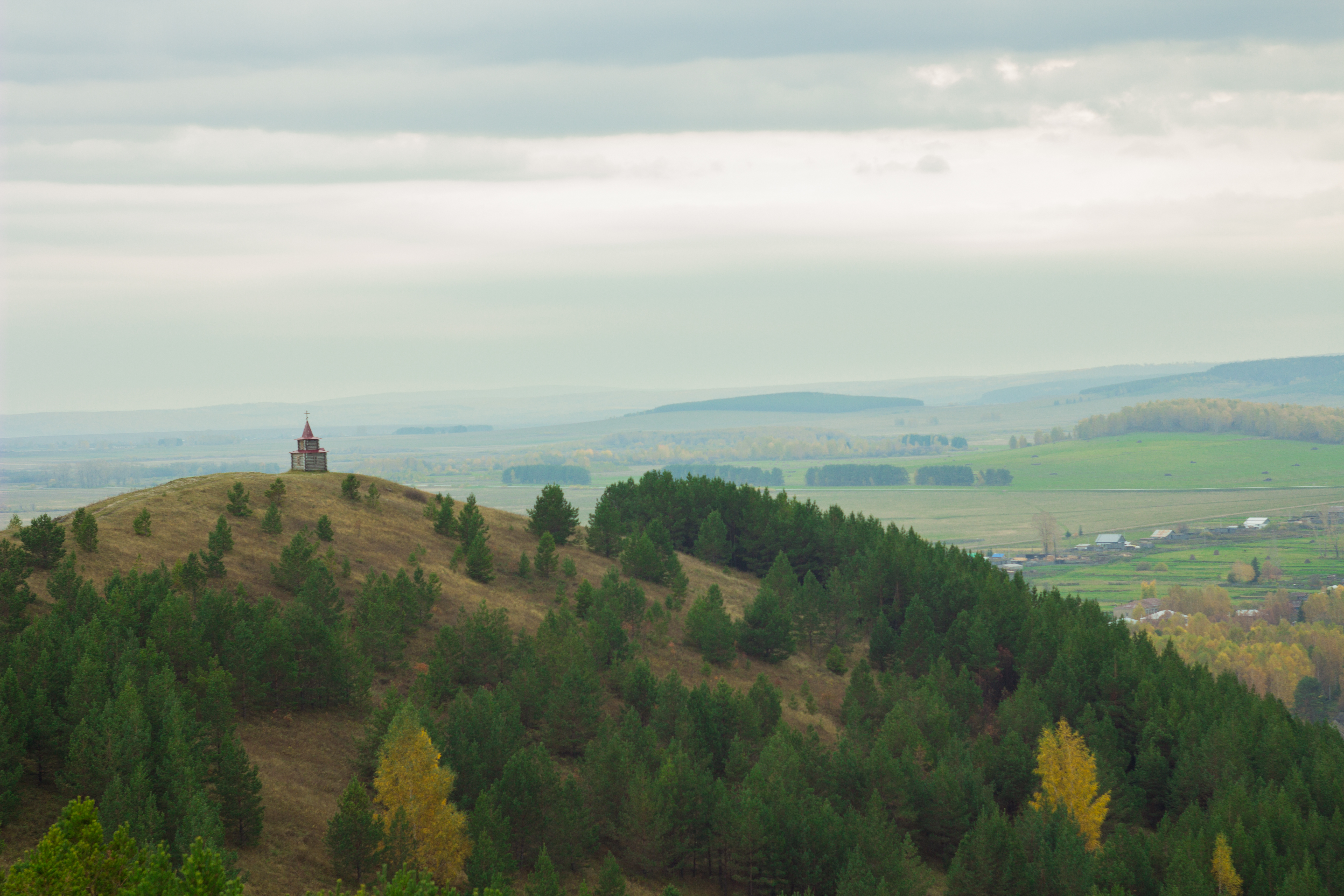 Гора Большая Тастуба: Дуванский район, Башкортостан This image is related to the protected area of Russia number 0210121